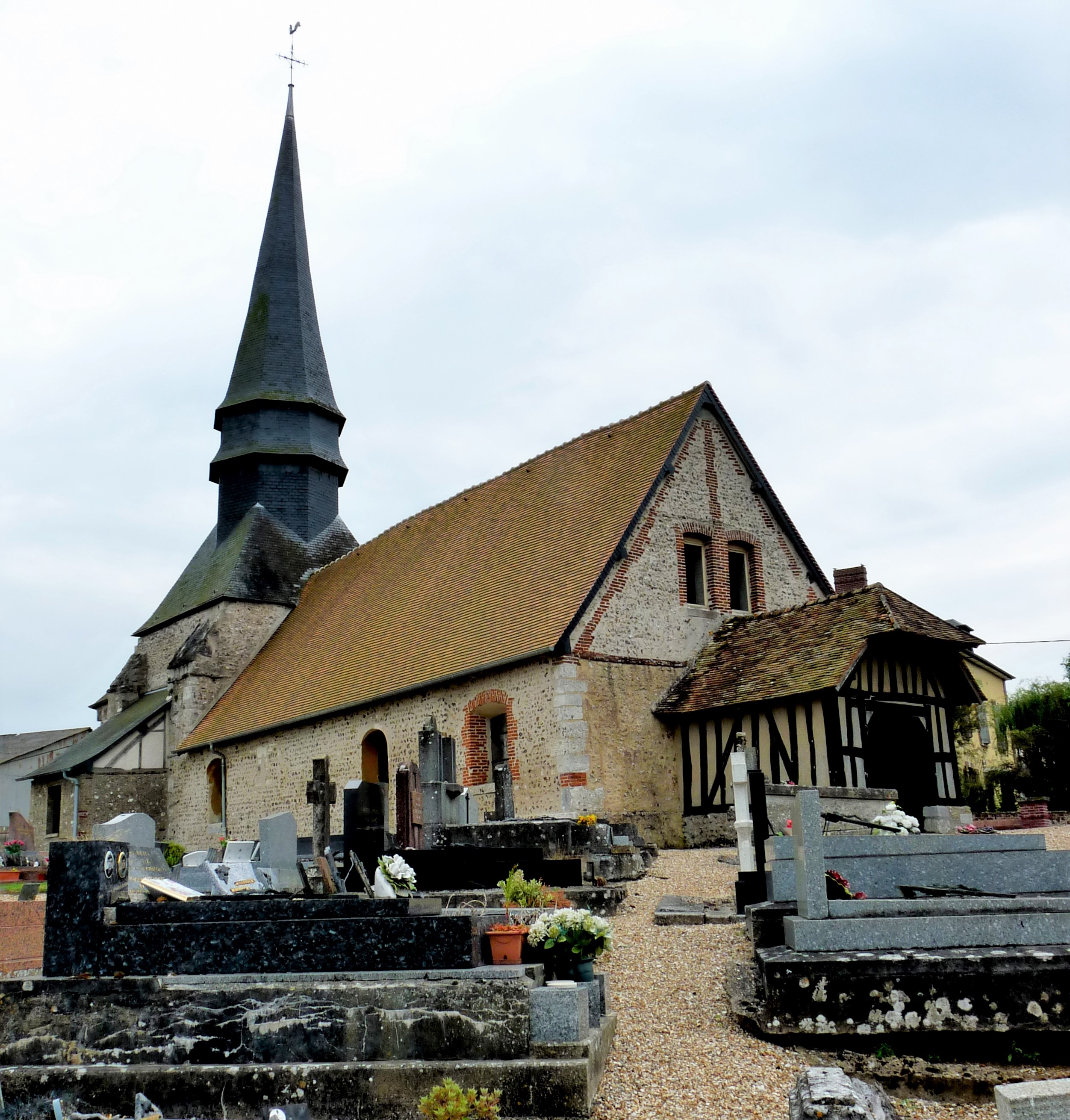 Église Saint-Pierre de Cuverville